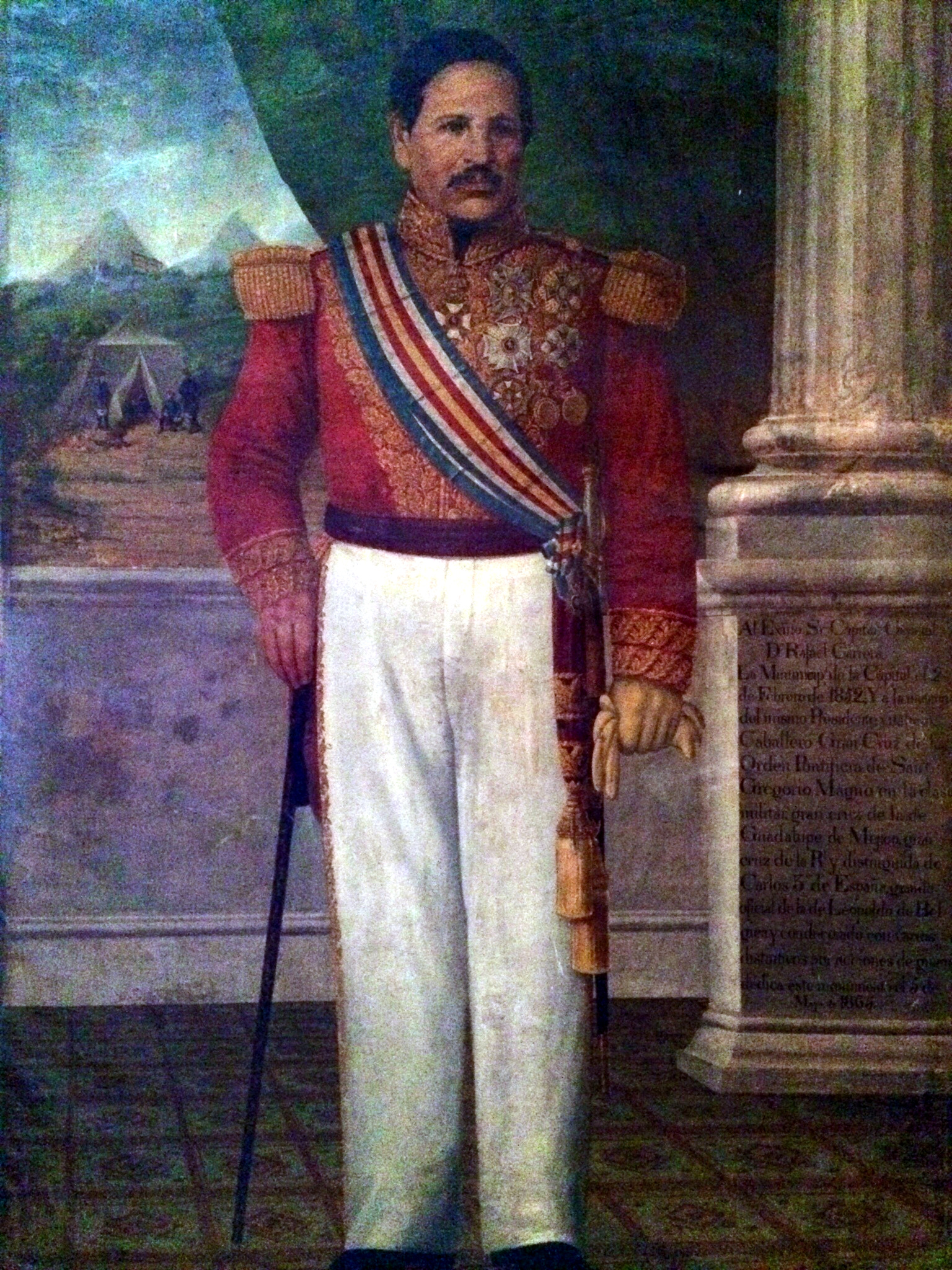 Retrato de cuerpo entero del presidente Rafael Carrera y Turcios